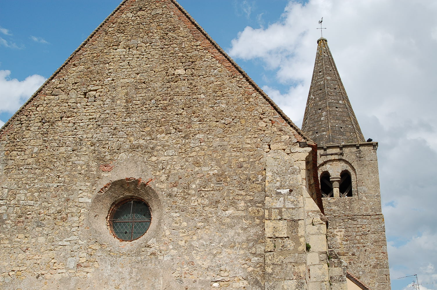 vue générale de l'édifice